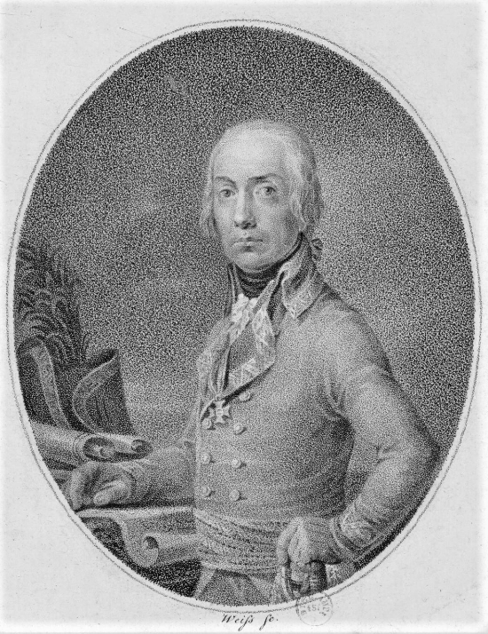 Anton von Zach (1747-1826), général autrichien. Il fut chef d'état-major de l'armée autrichienne à la bataille de Marengo où il fut fait prisonnier par les Français.